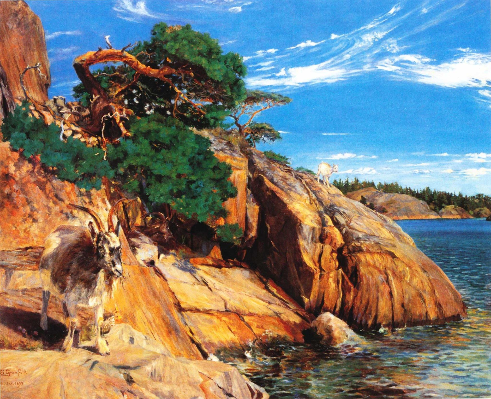 Sigrid Granfeltin maalaus Vuohia rantakalliolla eli Hiittinen. Kuuluu Taidesäätiö Meritan kokoelmiin.